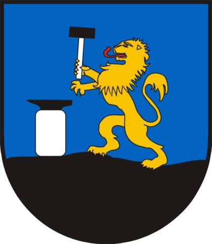 Herb miejscowości Kośmidry